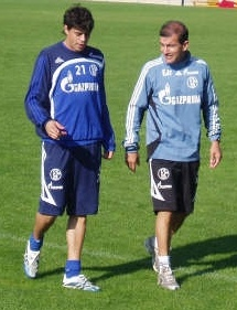 Uruguayian soccer player Carlos Grossmüller (left), playing for the Bundesliga side FC Schalke 04